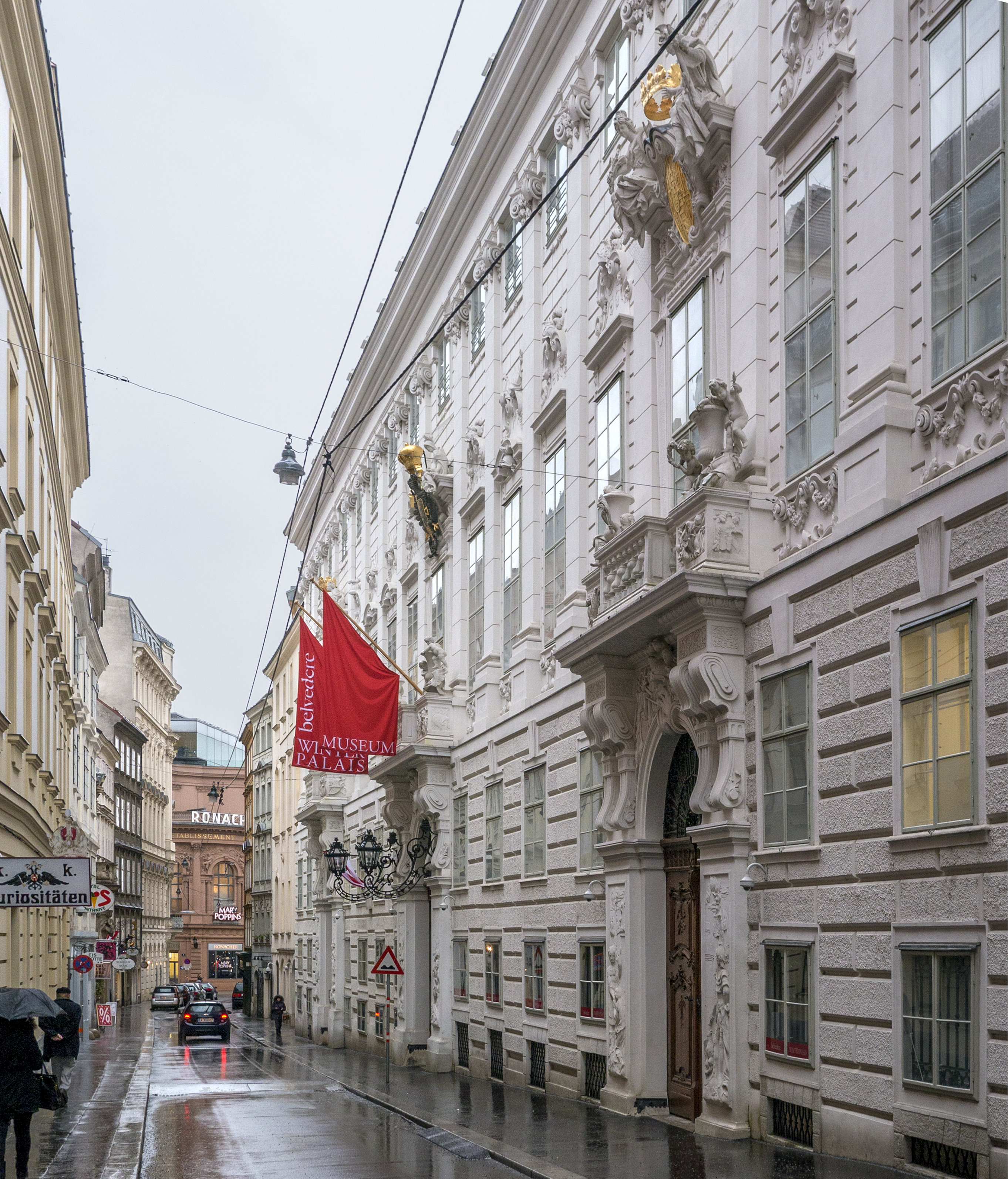 Ehem. Stadtpalais des Prinzen Eugen, BM für Finanzen